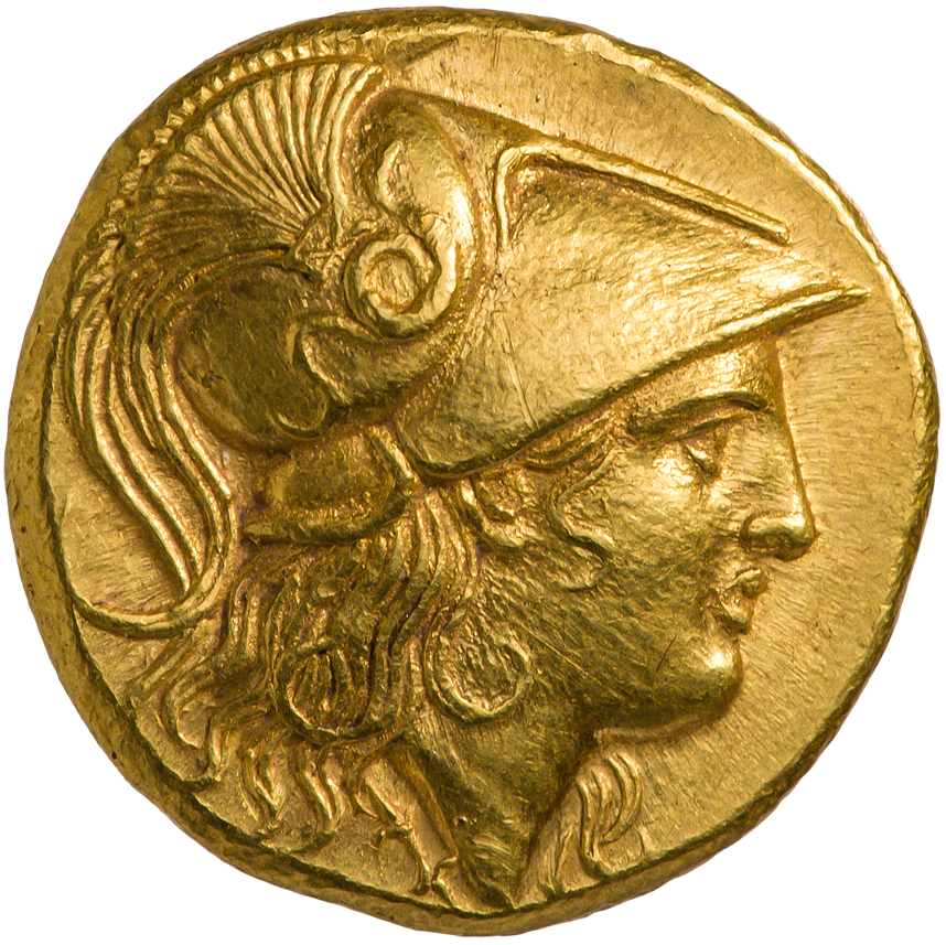 Македонское царство. Милет. Александр III Великий (336—323 гг. до н.э.). Статер. Чеканка при Филоксене (325—323 гг. до н.э.). Аверс. Голова Афины Паллады в аттическом шлеме, украшенном змеёй, вправо.